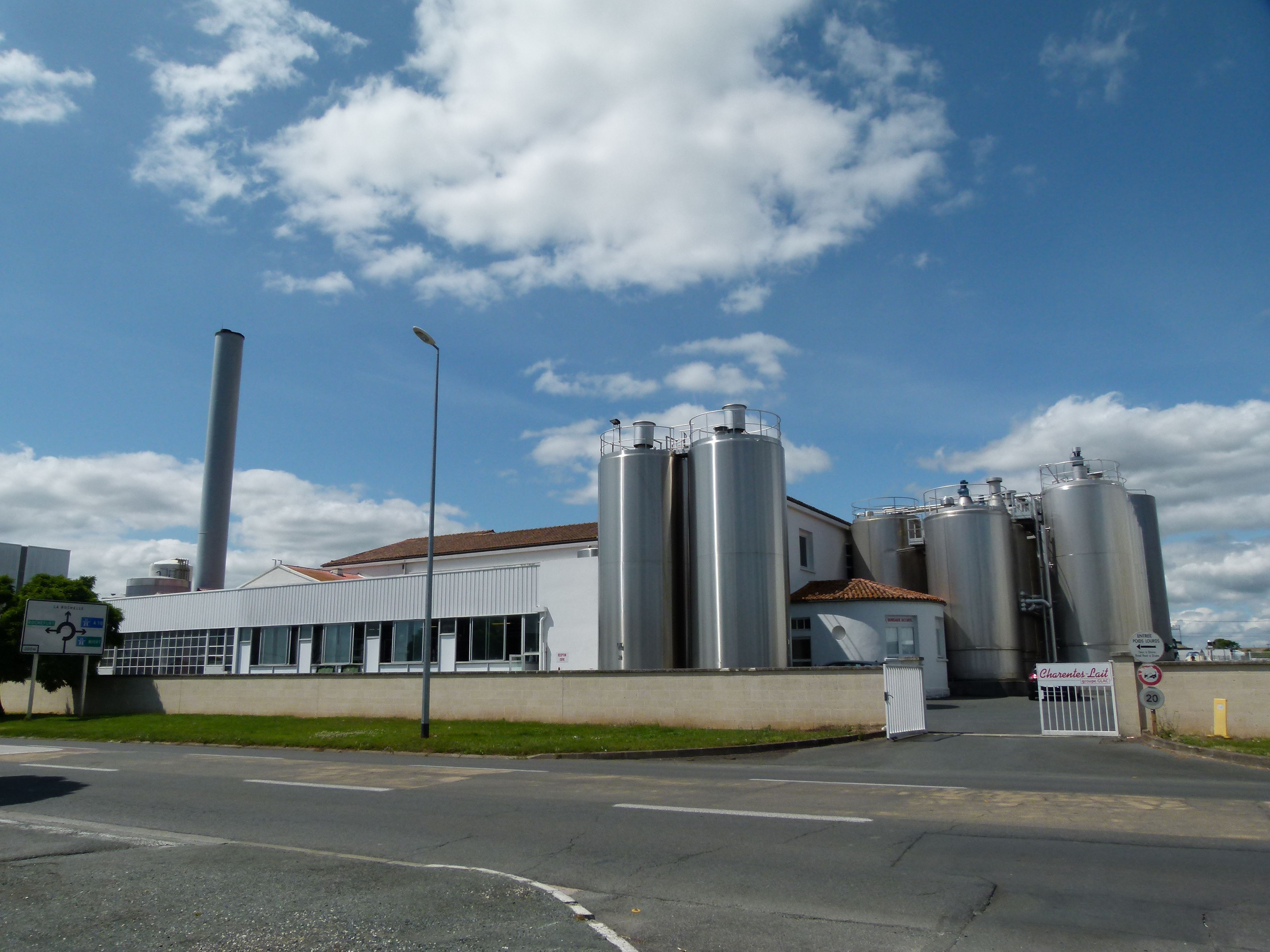 Le site de la laiterie industrielle abrite le siège du GLAC, un des tout premiers groupements coopératifs laitiers de France.